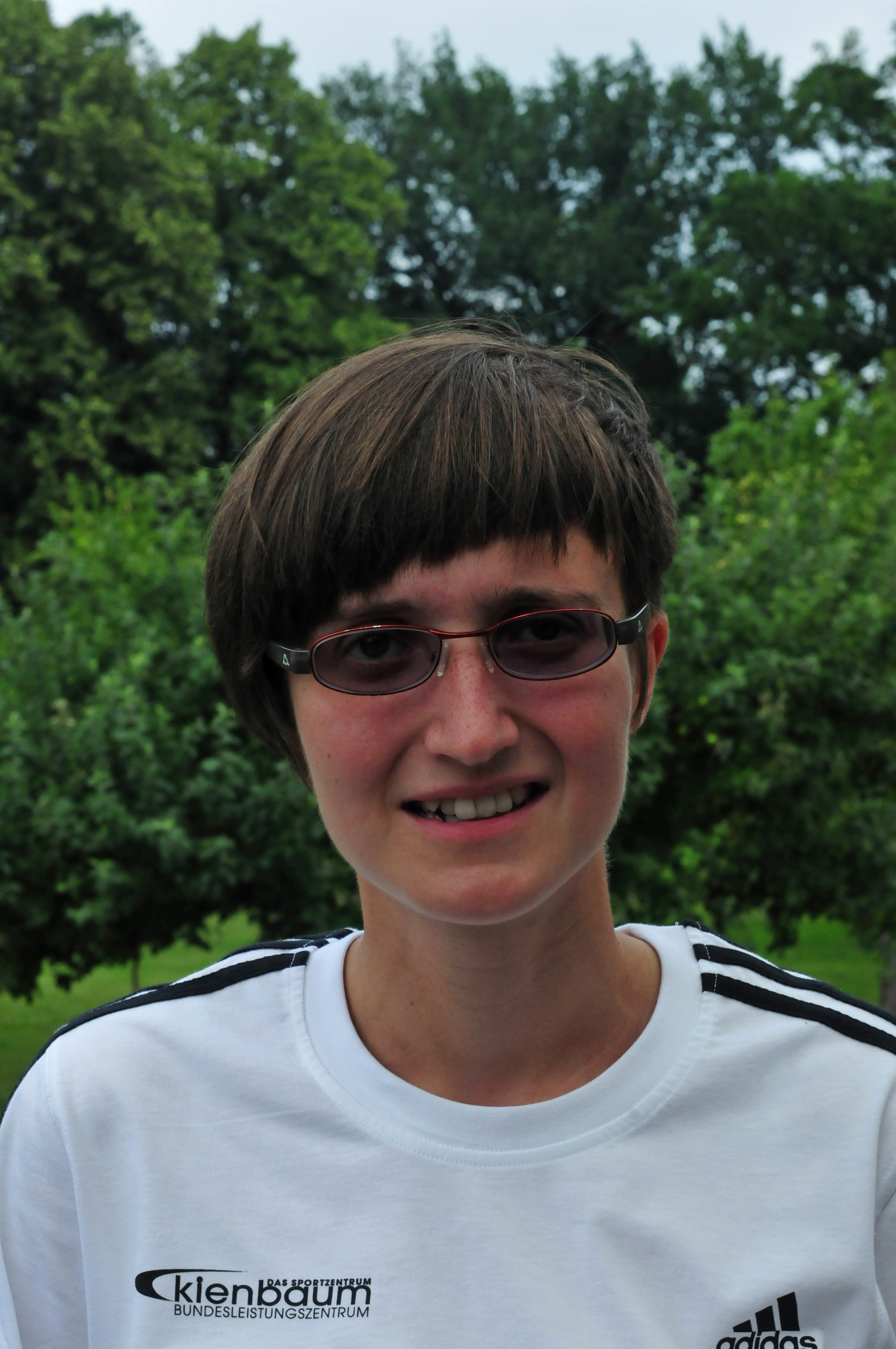 Pressetermin Olympiamannschaft in Kienbaum